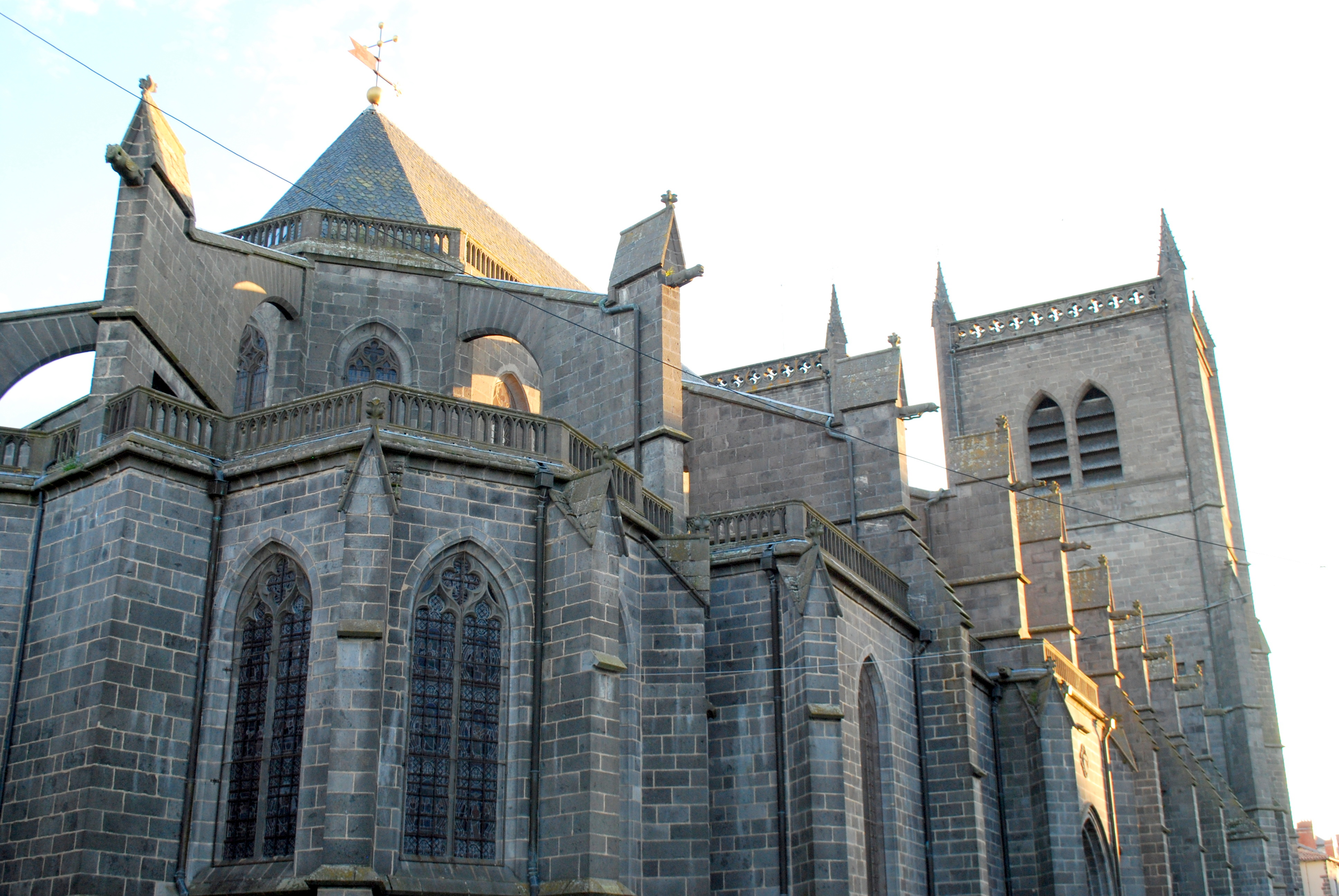 Cathédrale Saint-Pierre-et-Saint-Flour de Saint-Flour (Cantal, France), construite de 1398 à 1466 .